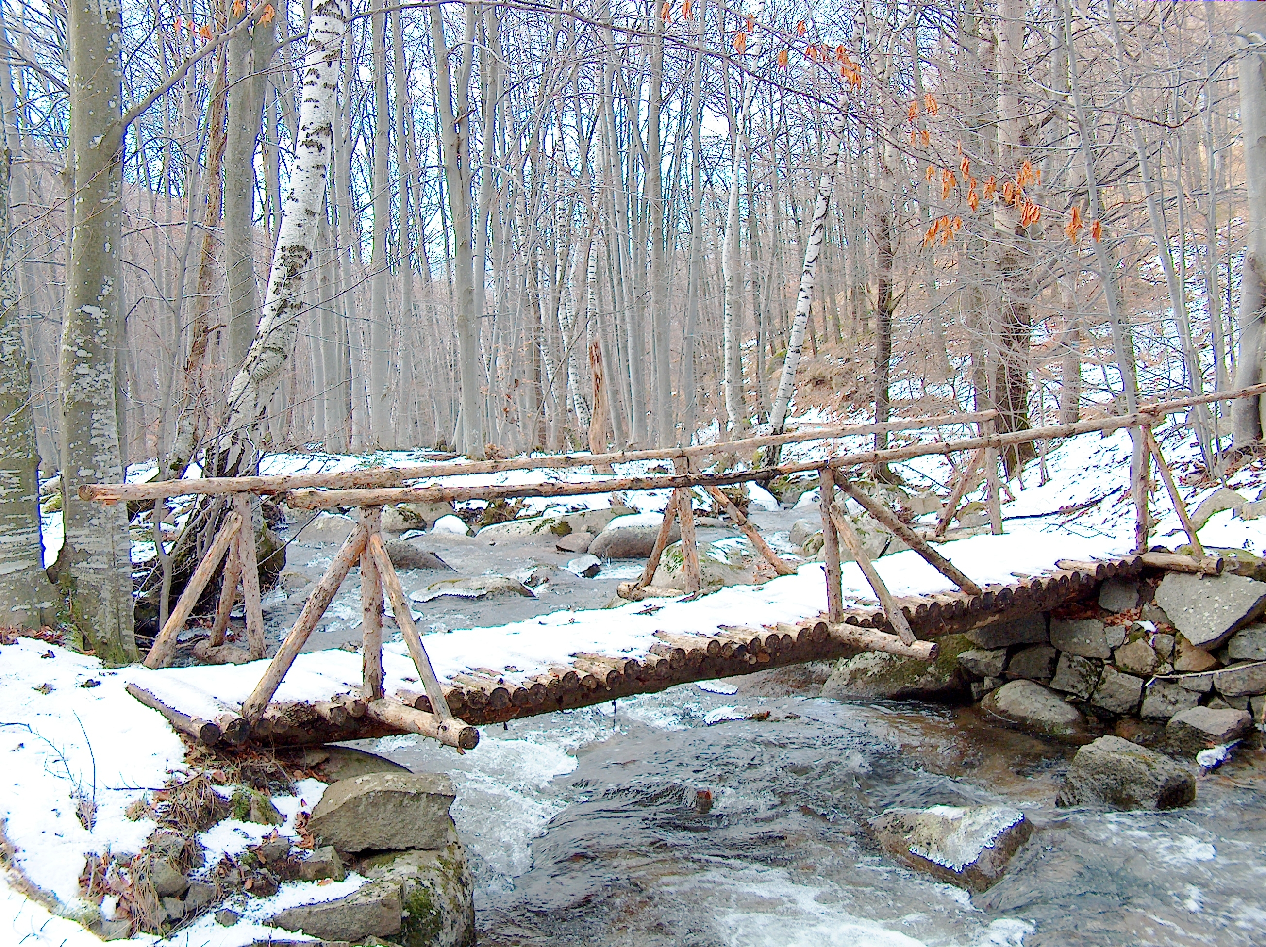 Vladayska River on Vitosha Mountain, Bulgaria.